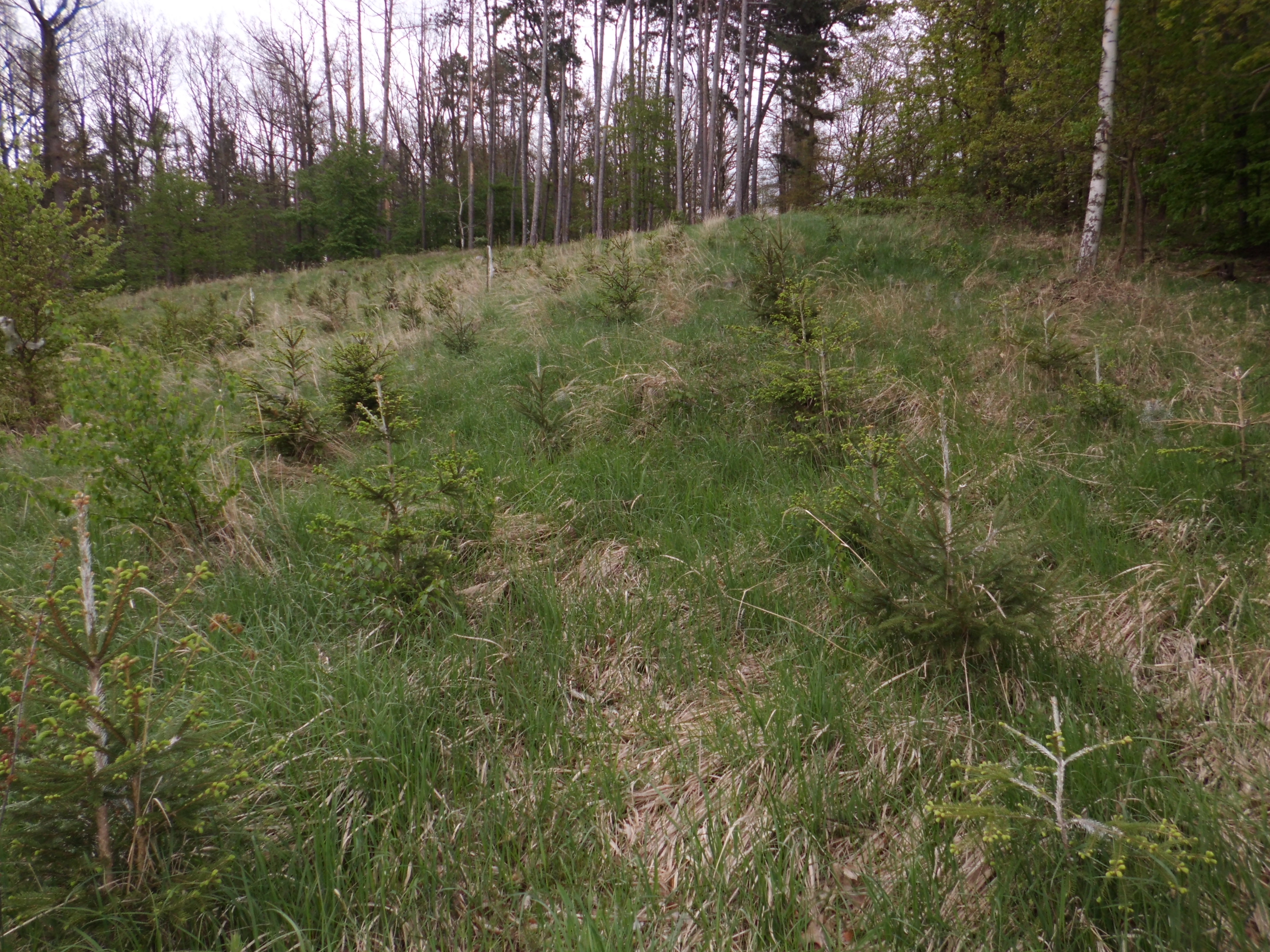 Hradec u Řepice